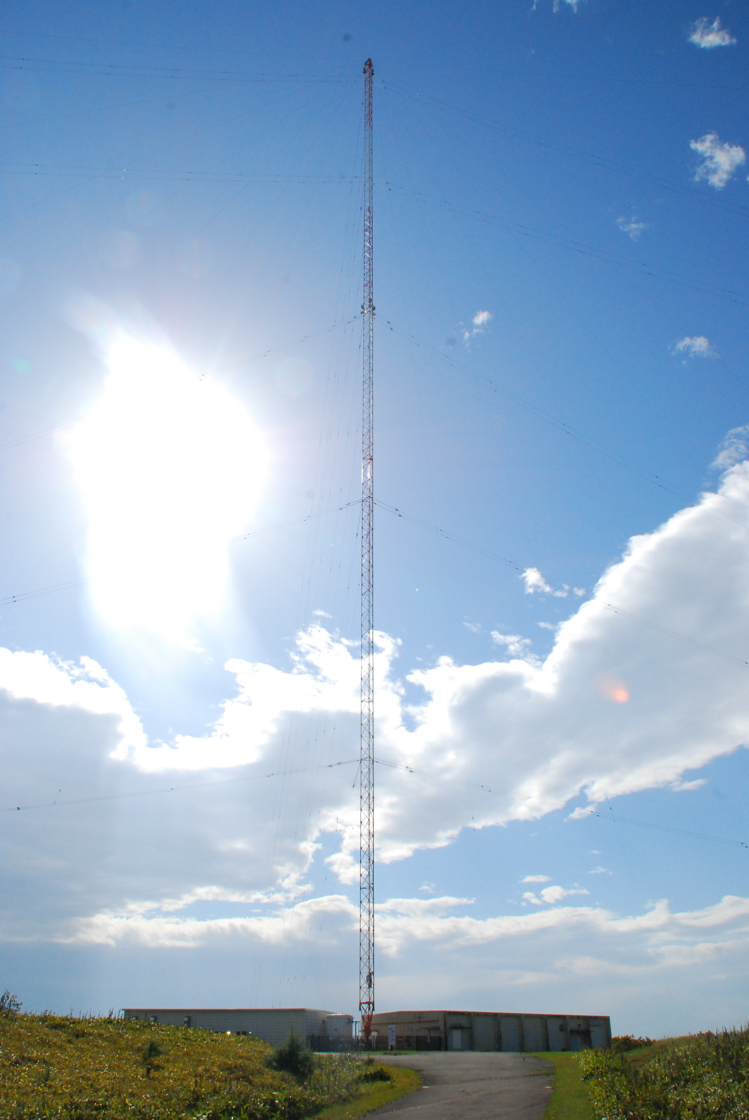 ロランCの送信設備と空中線